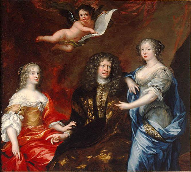 Bengt Classon Horn koos Margaretha Sparre ja Ingeborg Banériga